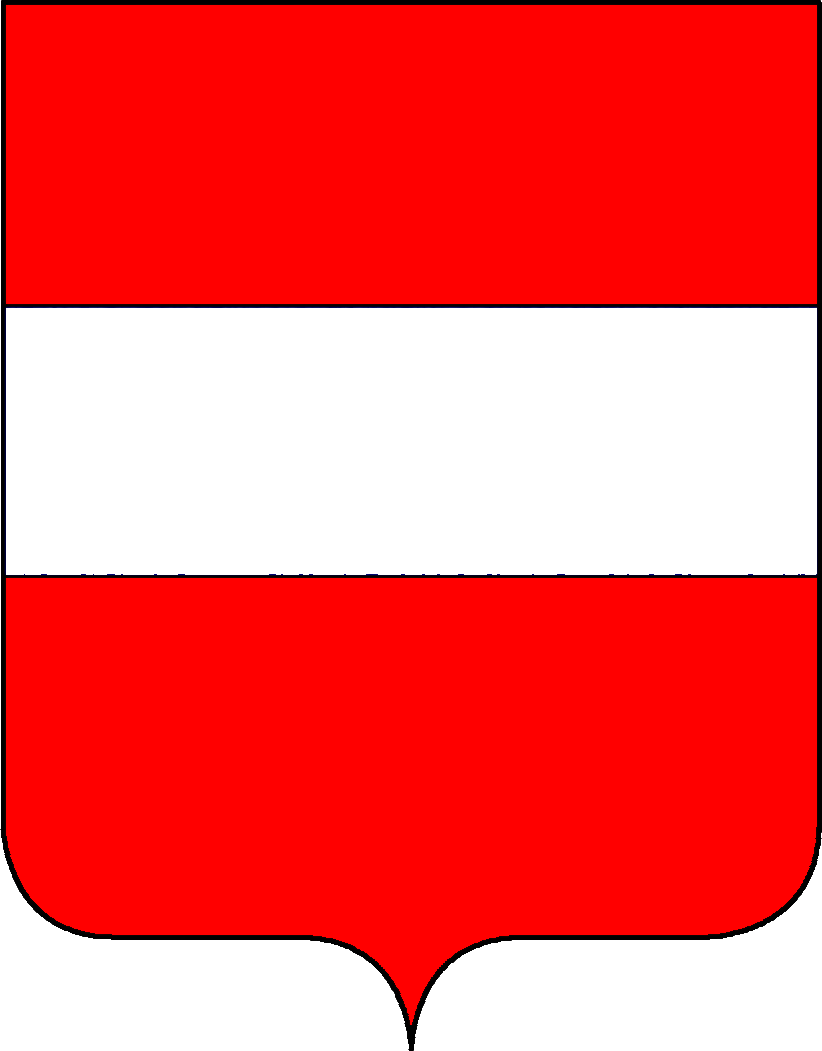 Stemma della famiglia Foscolo, appartenente al patriziato di Venezia.